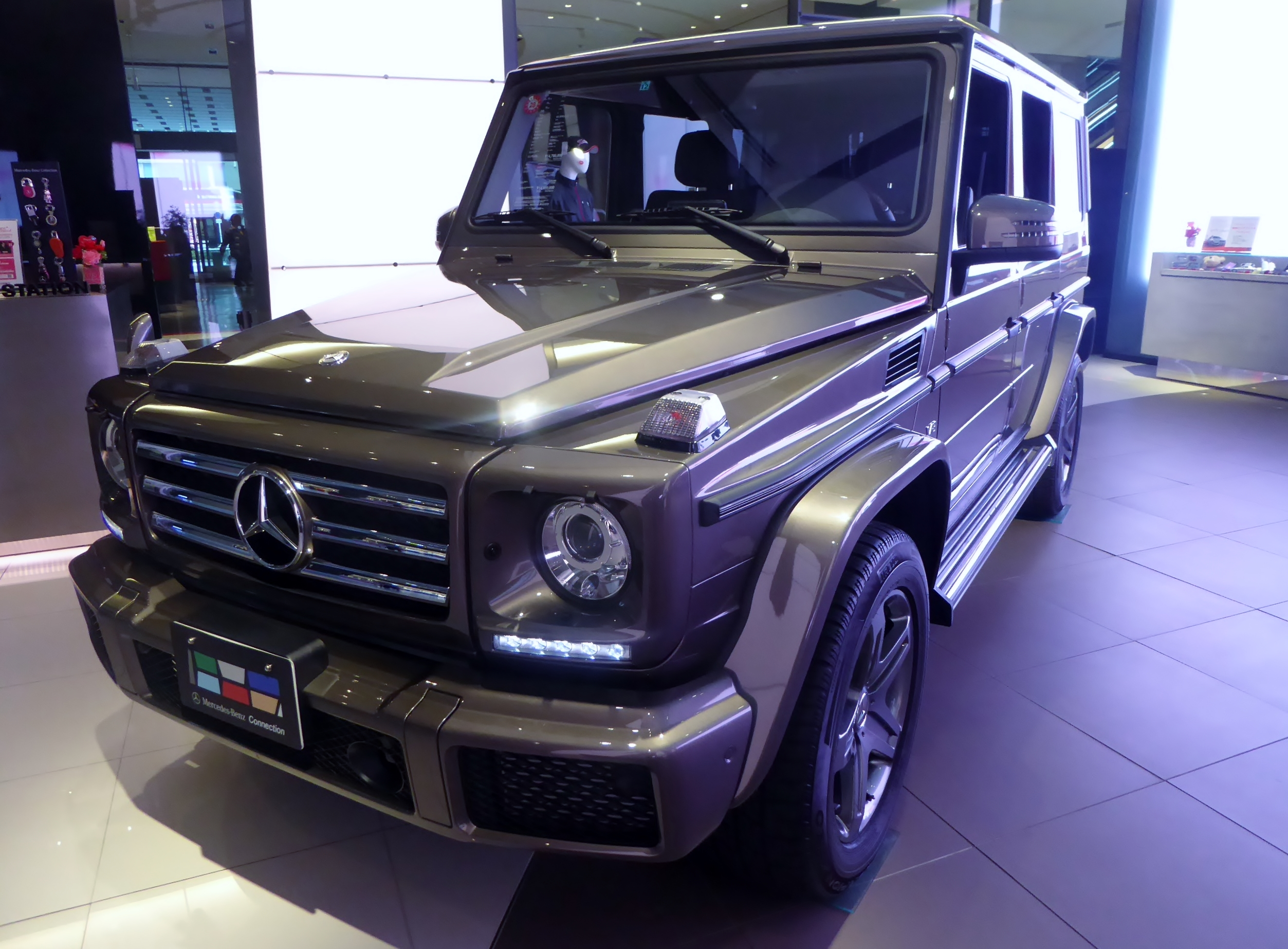 W463型メルセデス・ベンツ・G550をフロントから撮影。